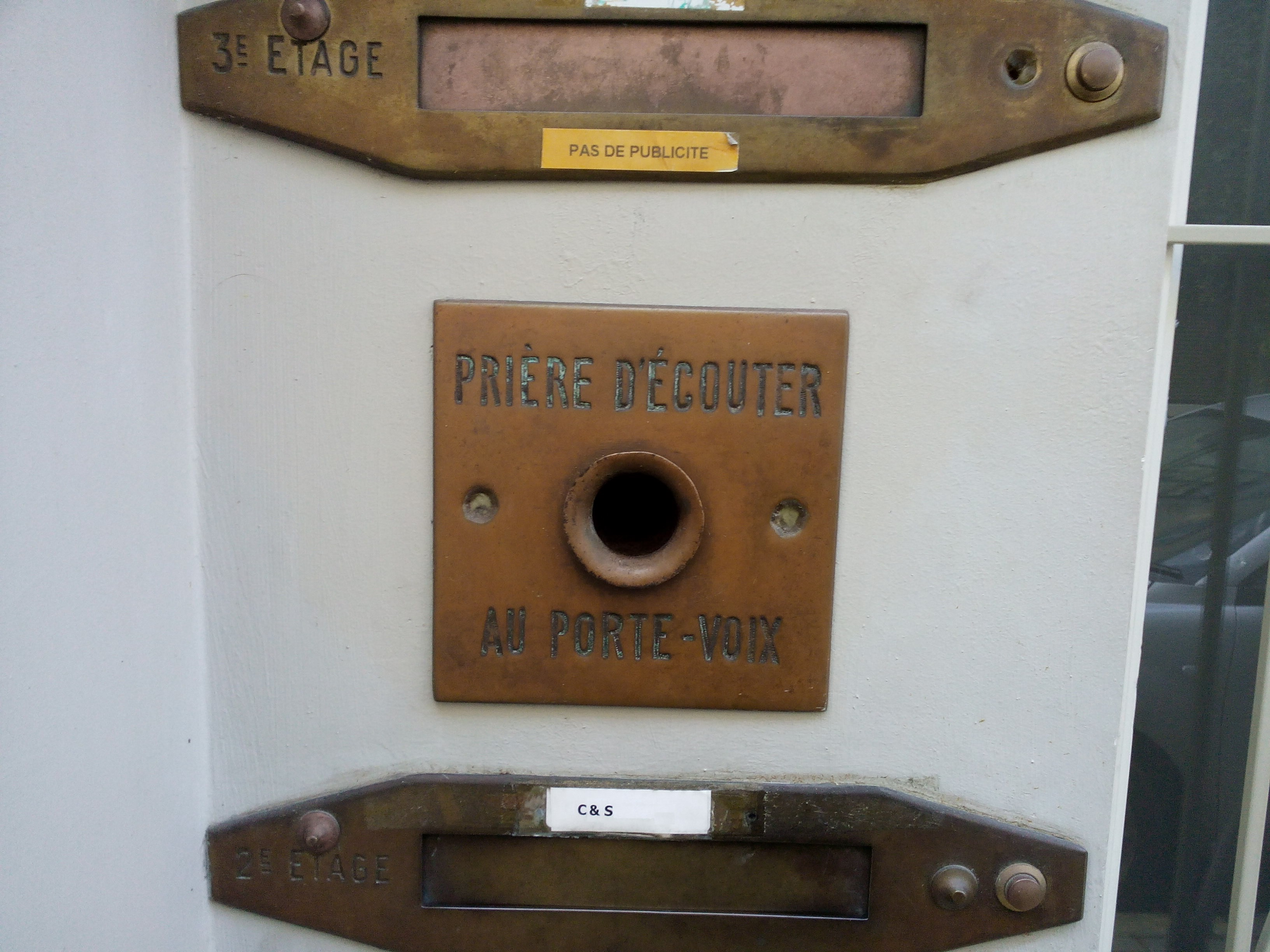 Parlophone (intercom domestique) pneumatique ou tube acoustique. la voix est portée par un conduit. Bruxelles (Ixelles) rue Jean d'Ardenne. Photographié en 2014.